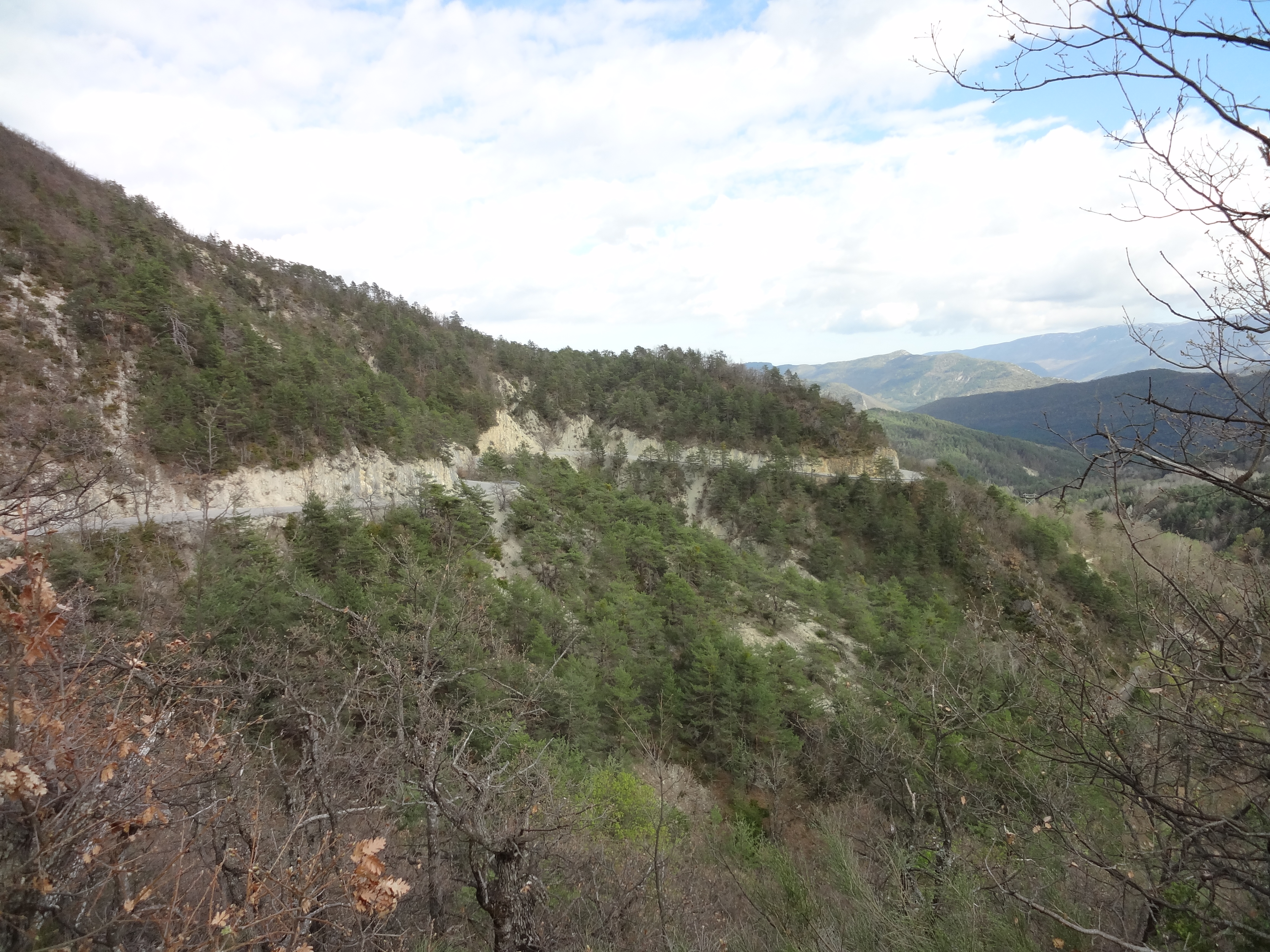 route départementale RD 10 entre La Rochette et Saint-Pierre(Alpes-de-Haute-Provence)